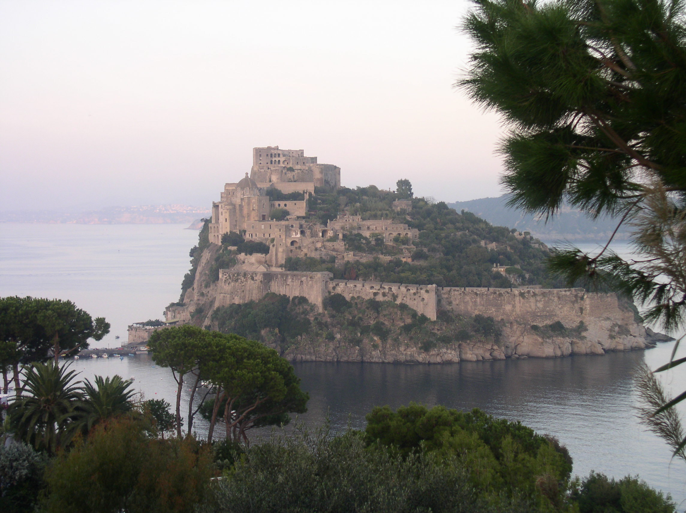 Le chateau Aragonais d'Ischia